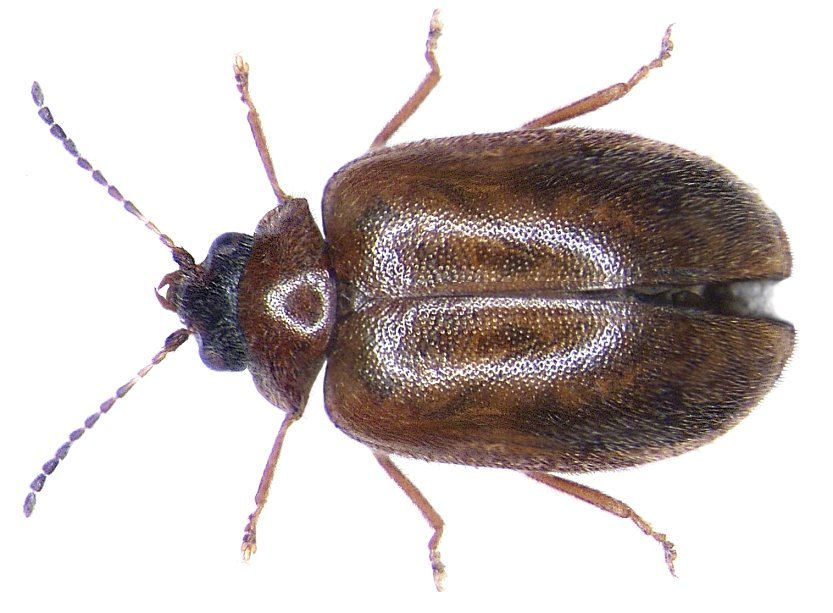 Cyphon variabilis (Thunberg, 1787) Familie: Scirtidae Groesse: 3-4 mm Verbreitung: Europa Ökologie: in Feuchtgebieten Fundort: Germania, Bayern, Oberfranken, Selbitz leg.det. U.Schmidt, 1972 Photo: U.Schmidt, 2005